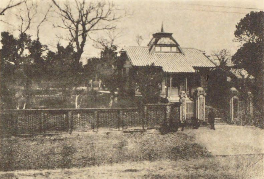 日治時期臺中的傳染病醫院